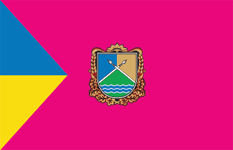 Прапор Куйбишевського району